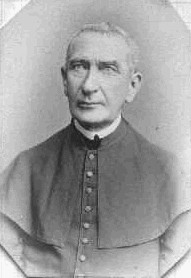 Jan Berger (1816-1897), rakouský římskokatolický duchovní a politik